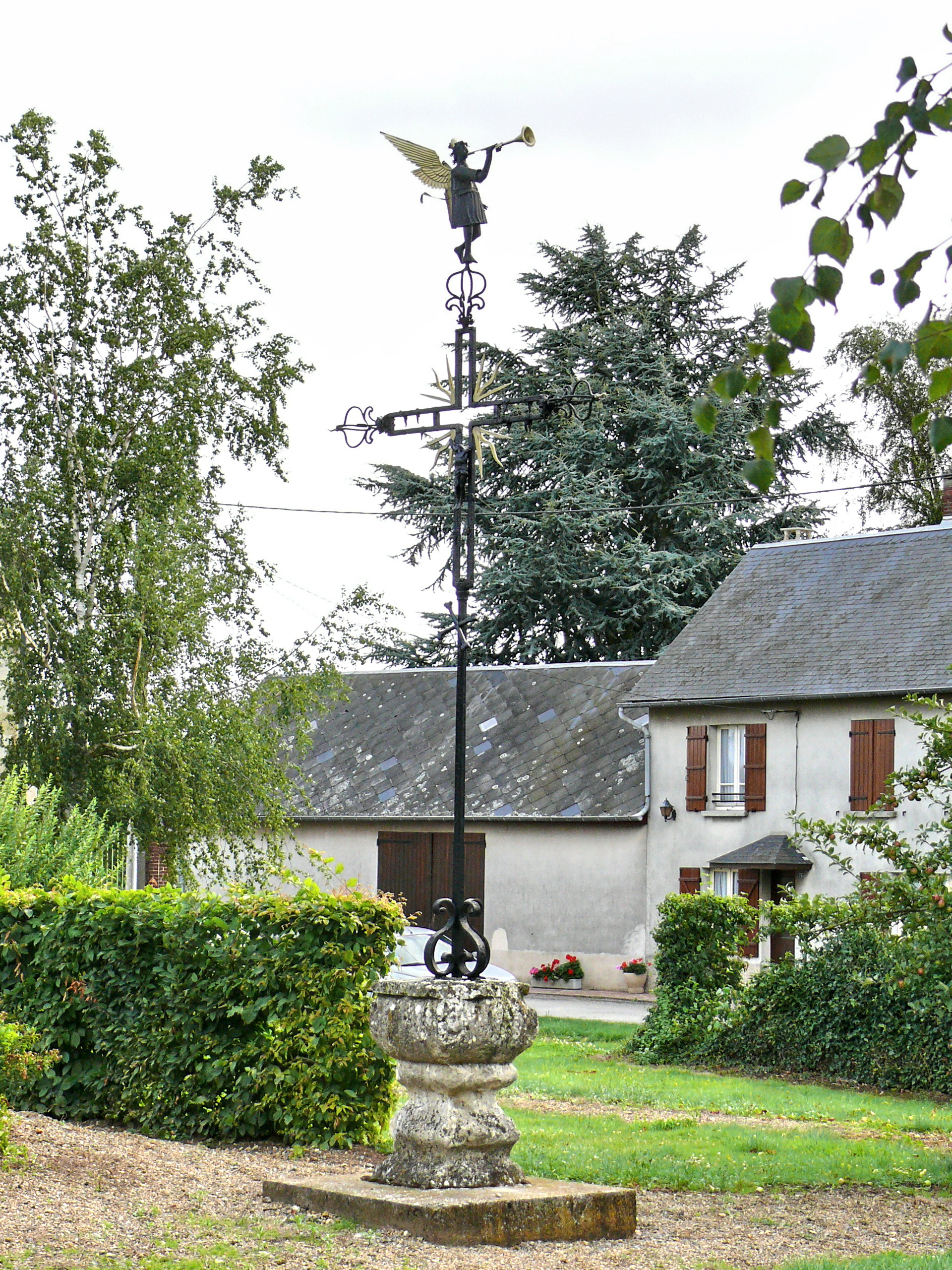 Calvaire surmonté d'un archange à la trompette, dans l'ancien enclos funéraire jouxtant l'église Saint-Martin de Doméliers (Oise - Picardie - France)